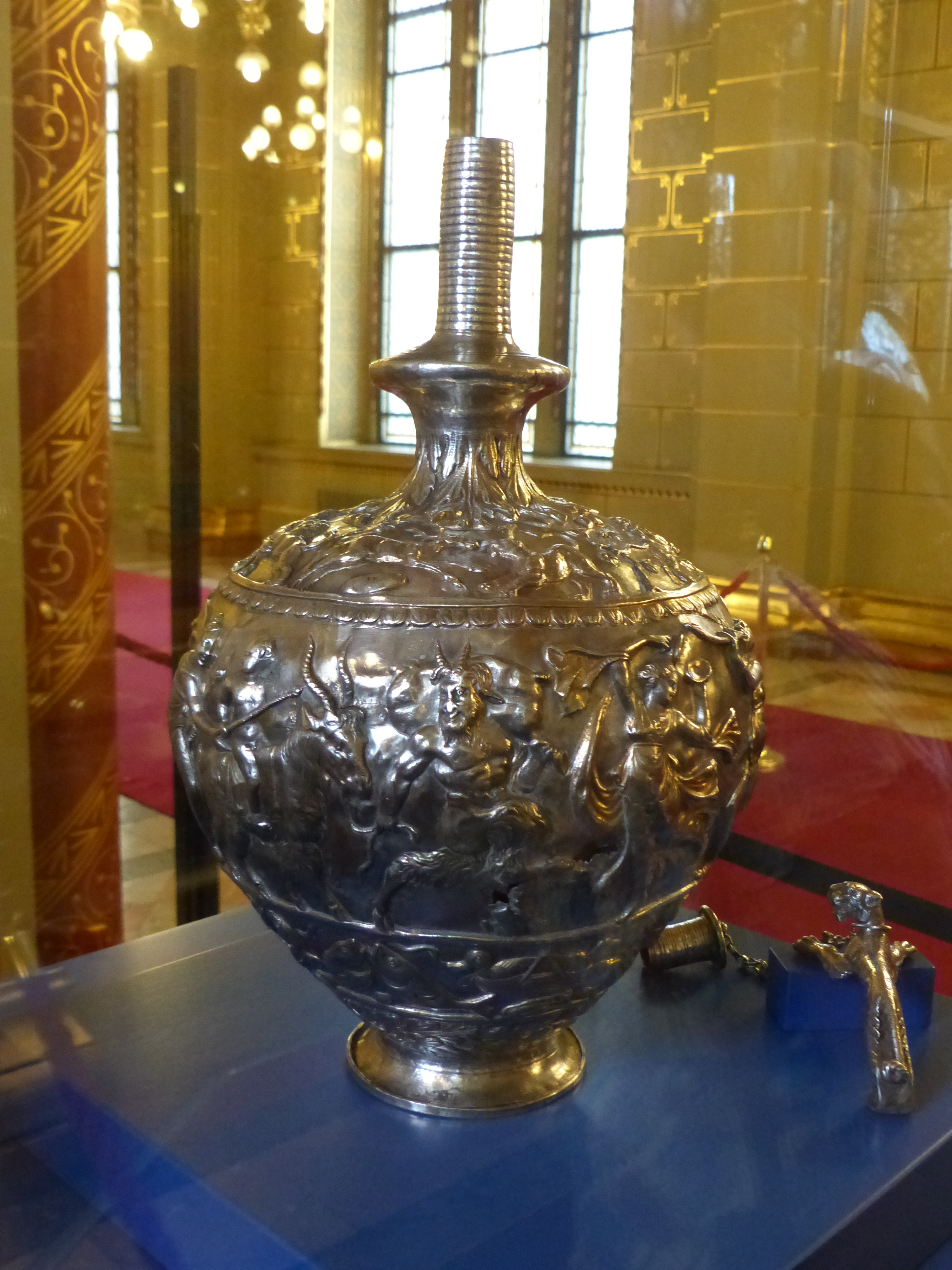 Dionüszosz amfóra. Seuso kincs. A felvétel 2017. július 17-én, hétfőn készült az Országházban. Magassága 38,5 cm, tömege 2,5 kg. Az amfórát bor felszolgálására használták. Díszítésének központi alakja Dionüszosz. Az edény egyik oldalán tobozzal díszített botjára támaszkodva bort tölt a lábánál ülő párduc szájába. Mindkét oldalán a kiséretéhez tartozó bacchánsnők és Pan látható. Önkívületben mulatozó menetet alkotnak.